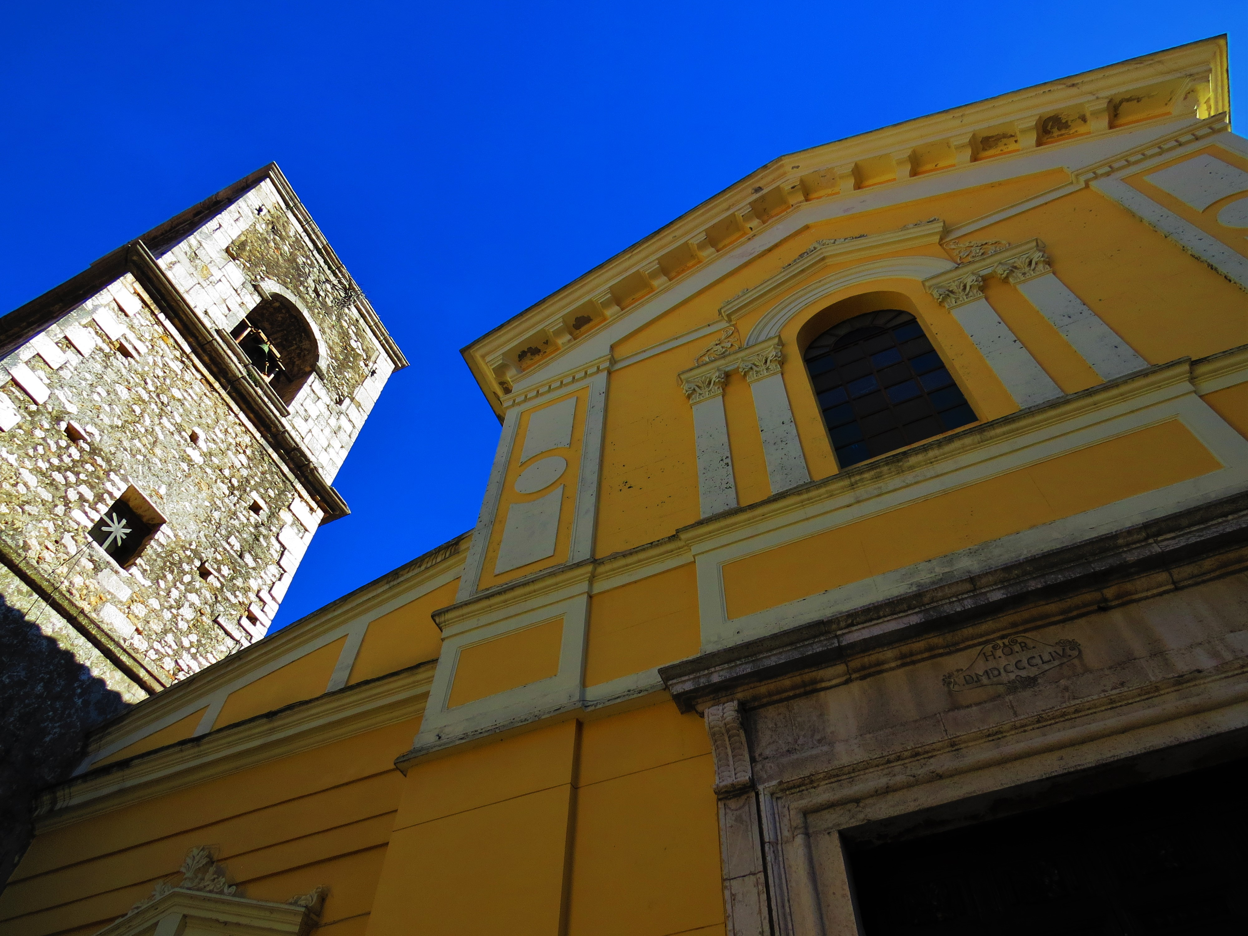 Cusano Mutri (BN)